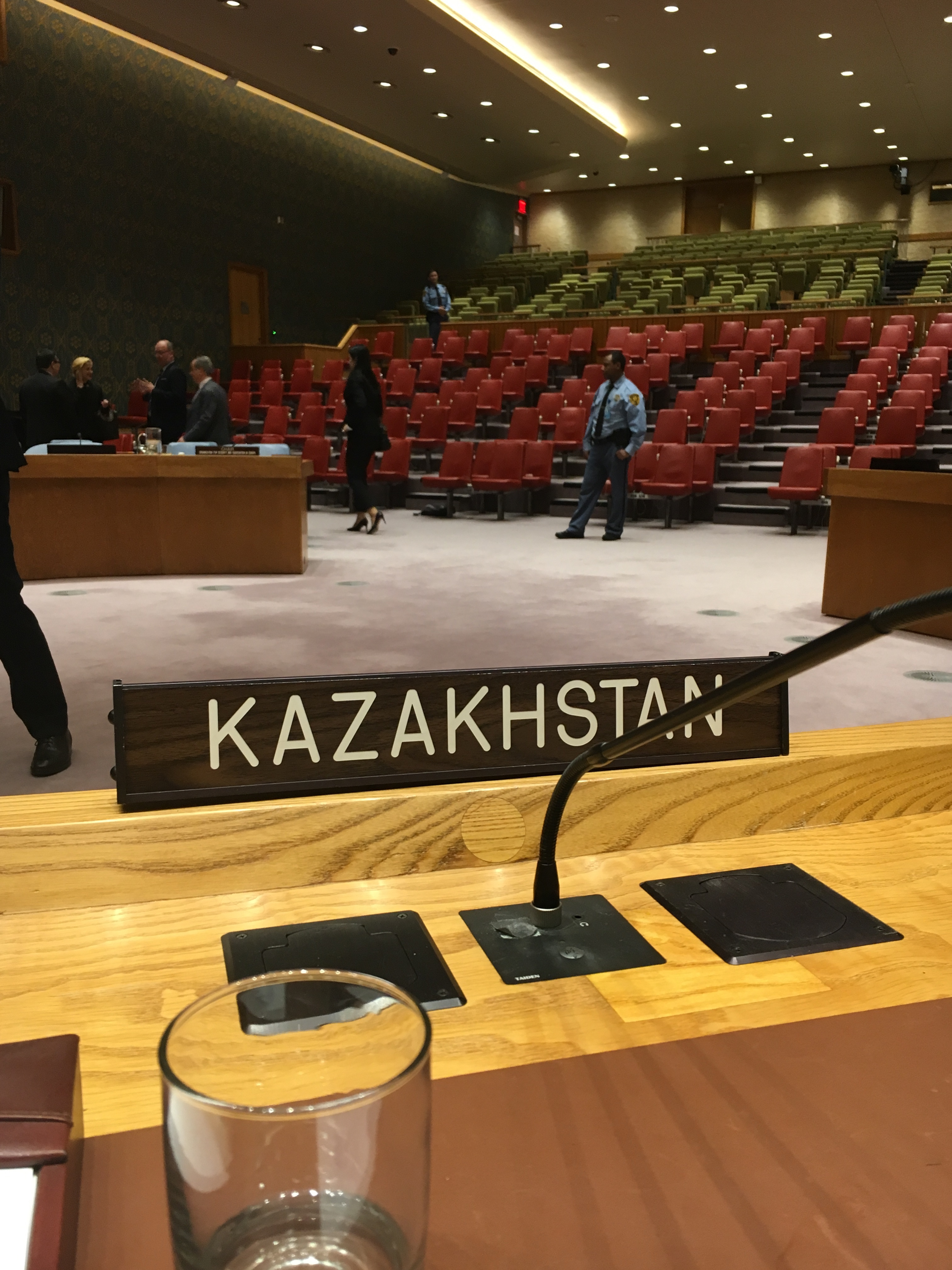 Казахстан в СБ ООН - 9 марта 2018 года